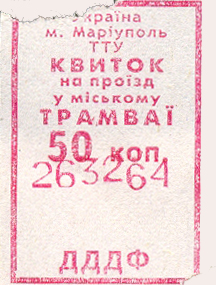 Mariupol_tram_ticket билет в трамвае Мариуполя - 2007, Ukraine